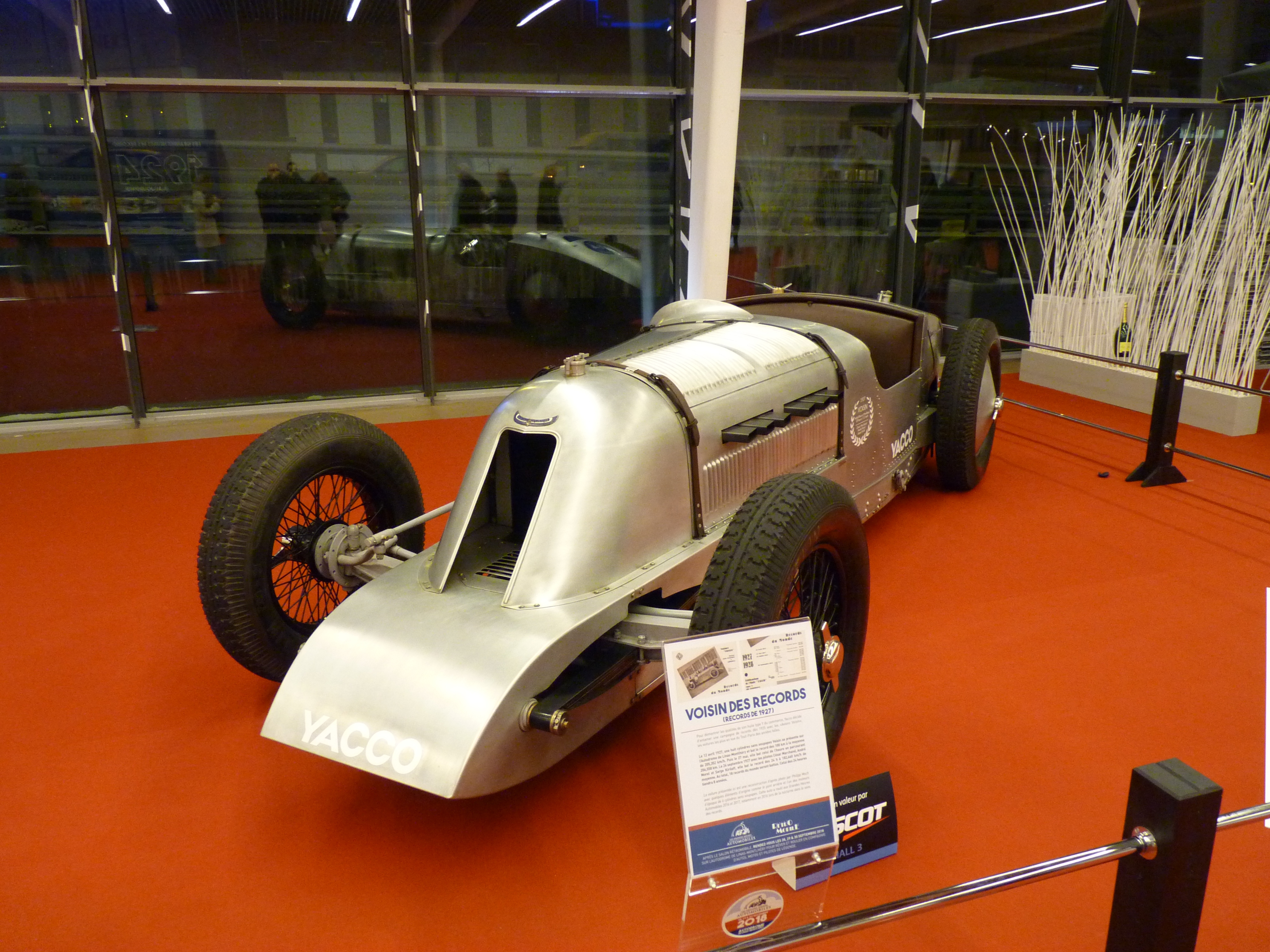 Les Grandes Heures Automobiles à Rétromobile 2018